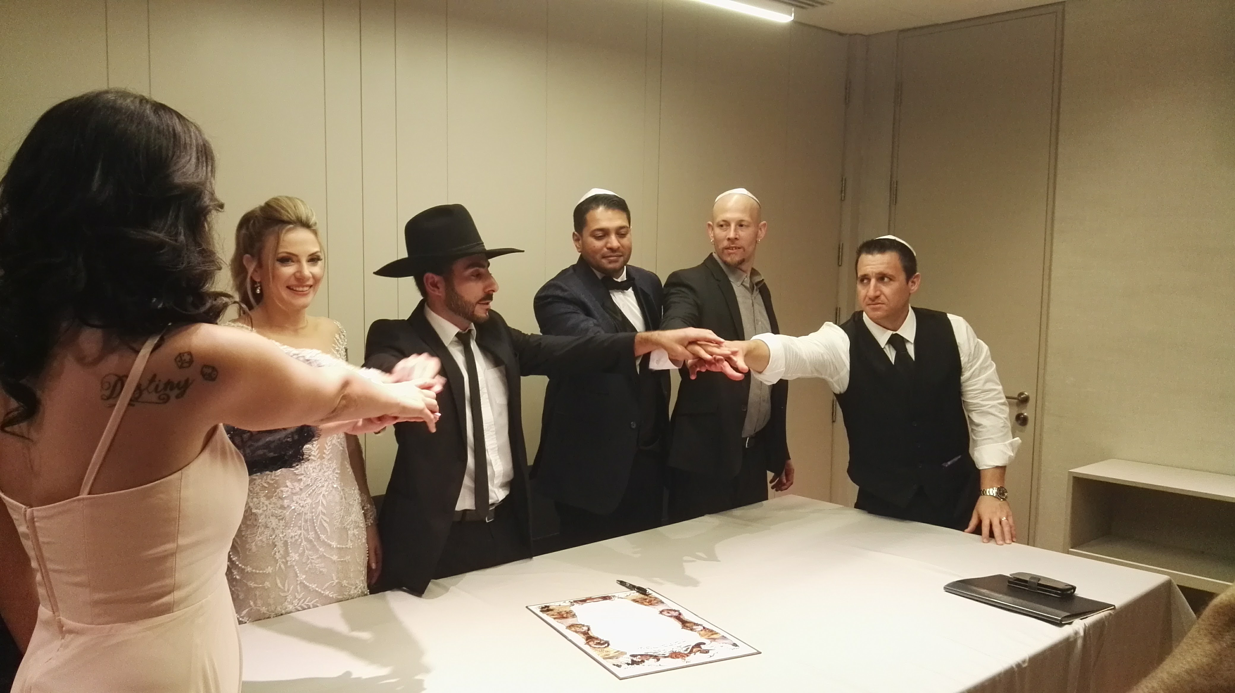 חתונה שיוויונית שנערכה על ידי הרבנות החילונית